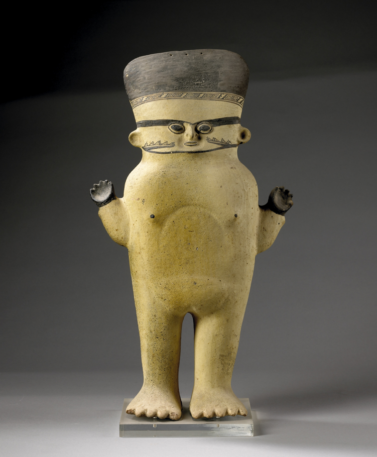 Statuette féminine, Pérou